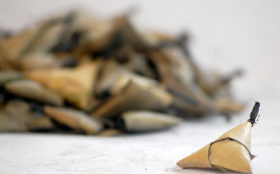 ഓലപ്പടക്കം.